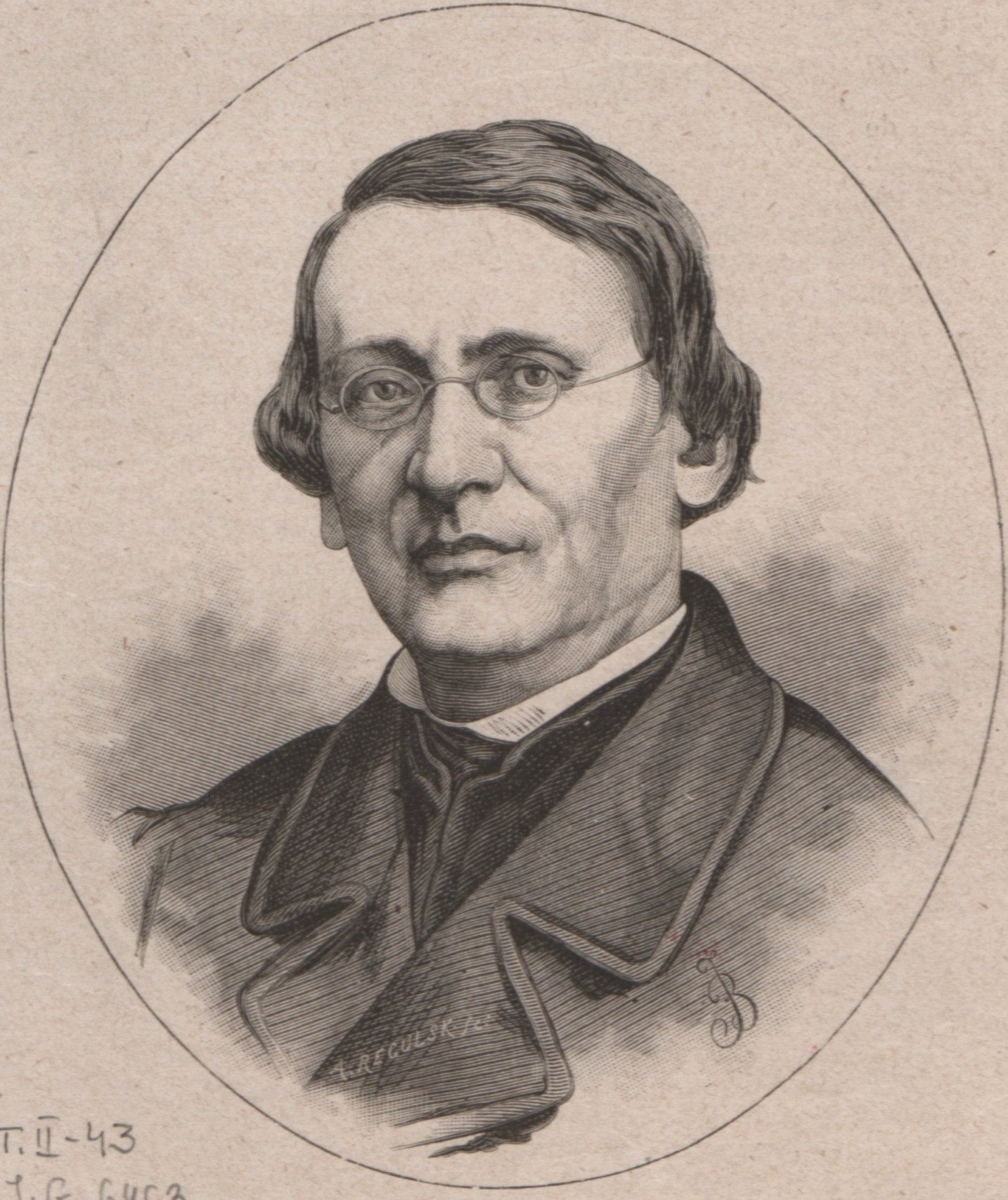 Eugeniusz Janota